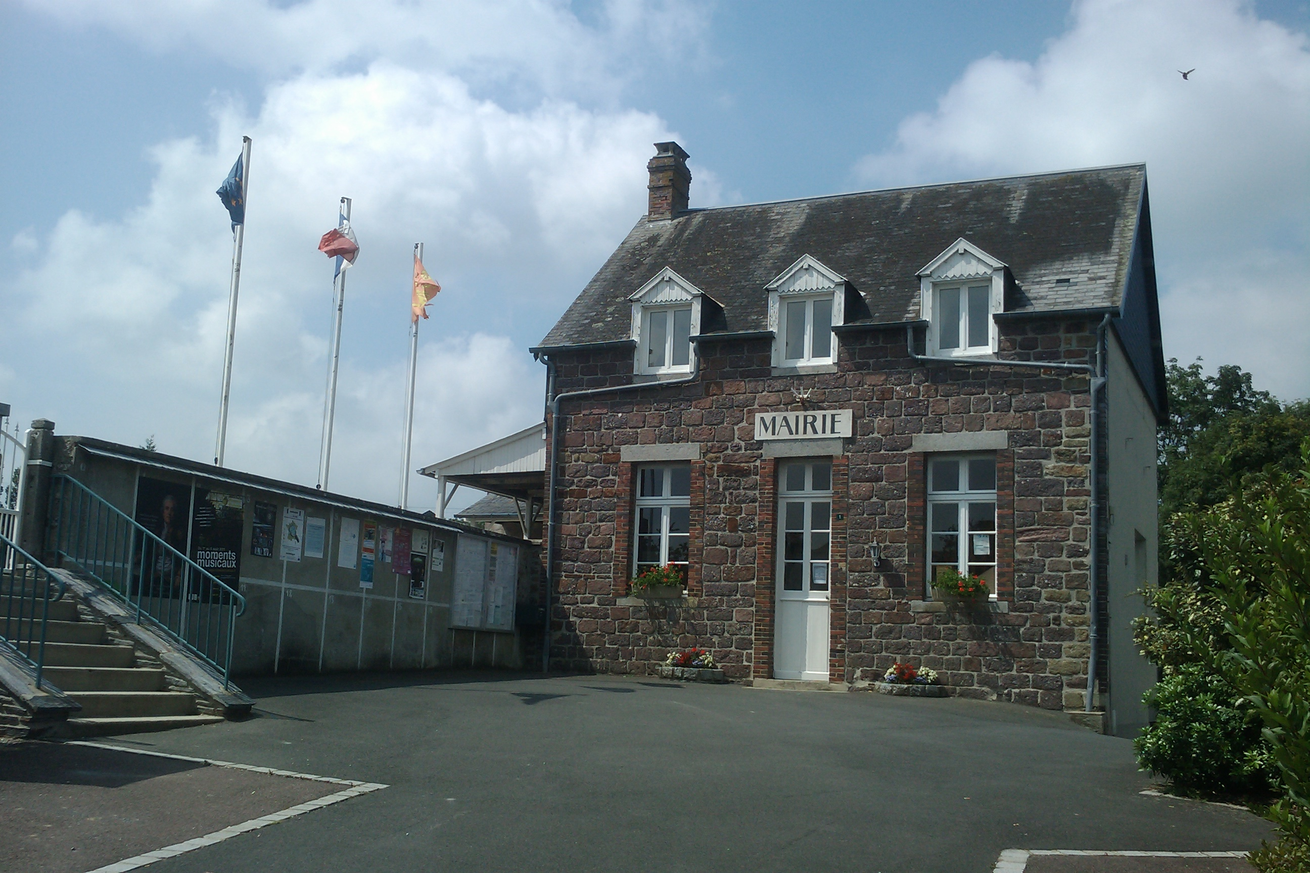 mairie de Saint-Romphaire